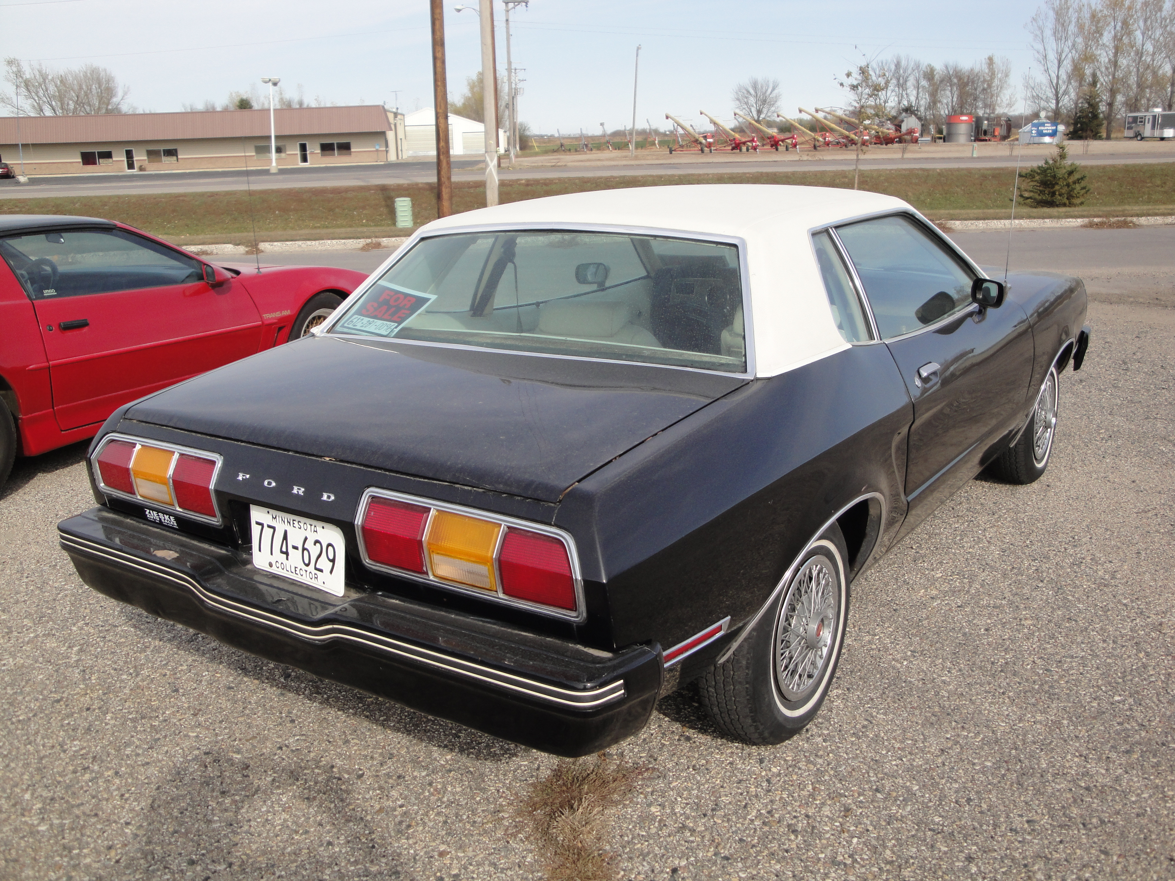 78 Ford Mustang II